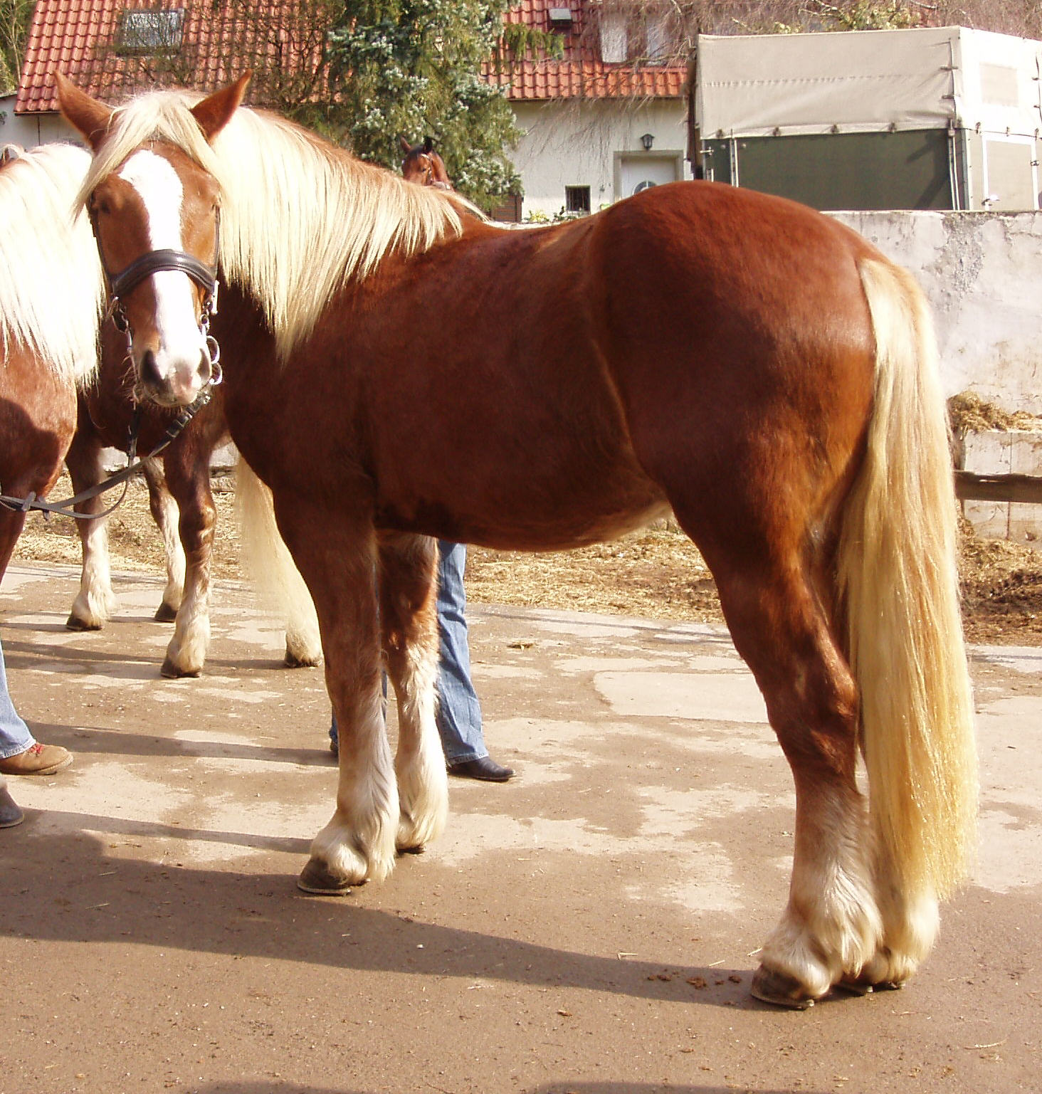 Schwarzwälder Kaltblut